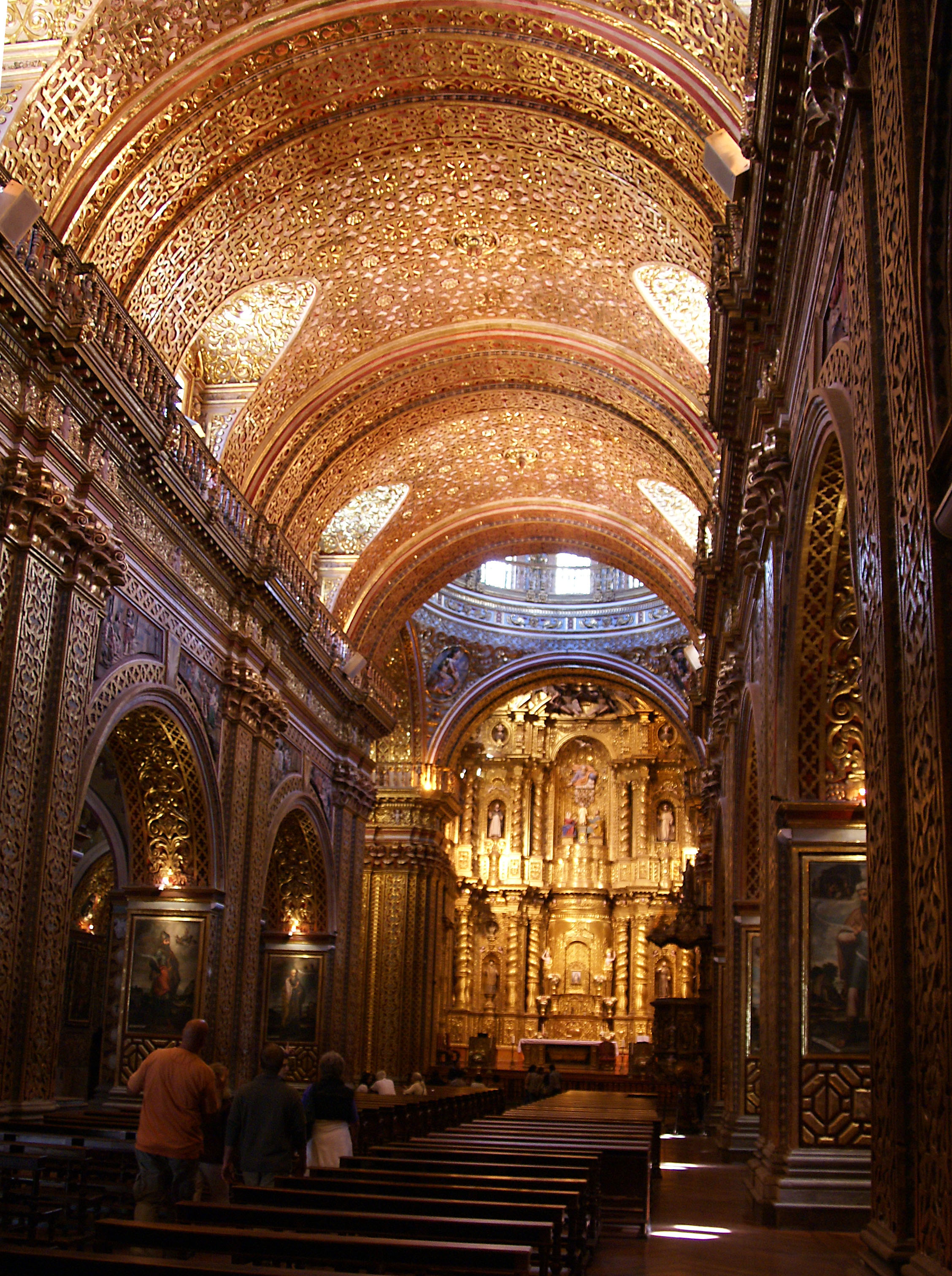 Iglesia de la Compania, Quit